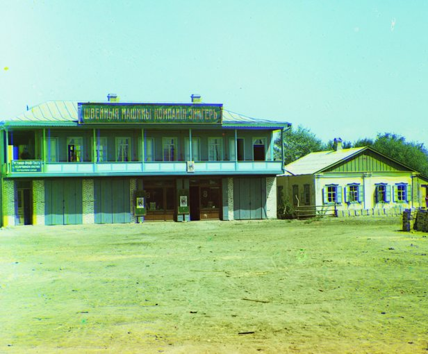 Sabirabad (Petropavlovka).Mehmanxana